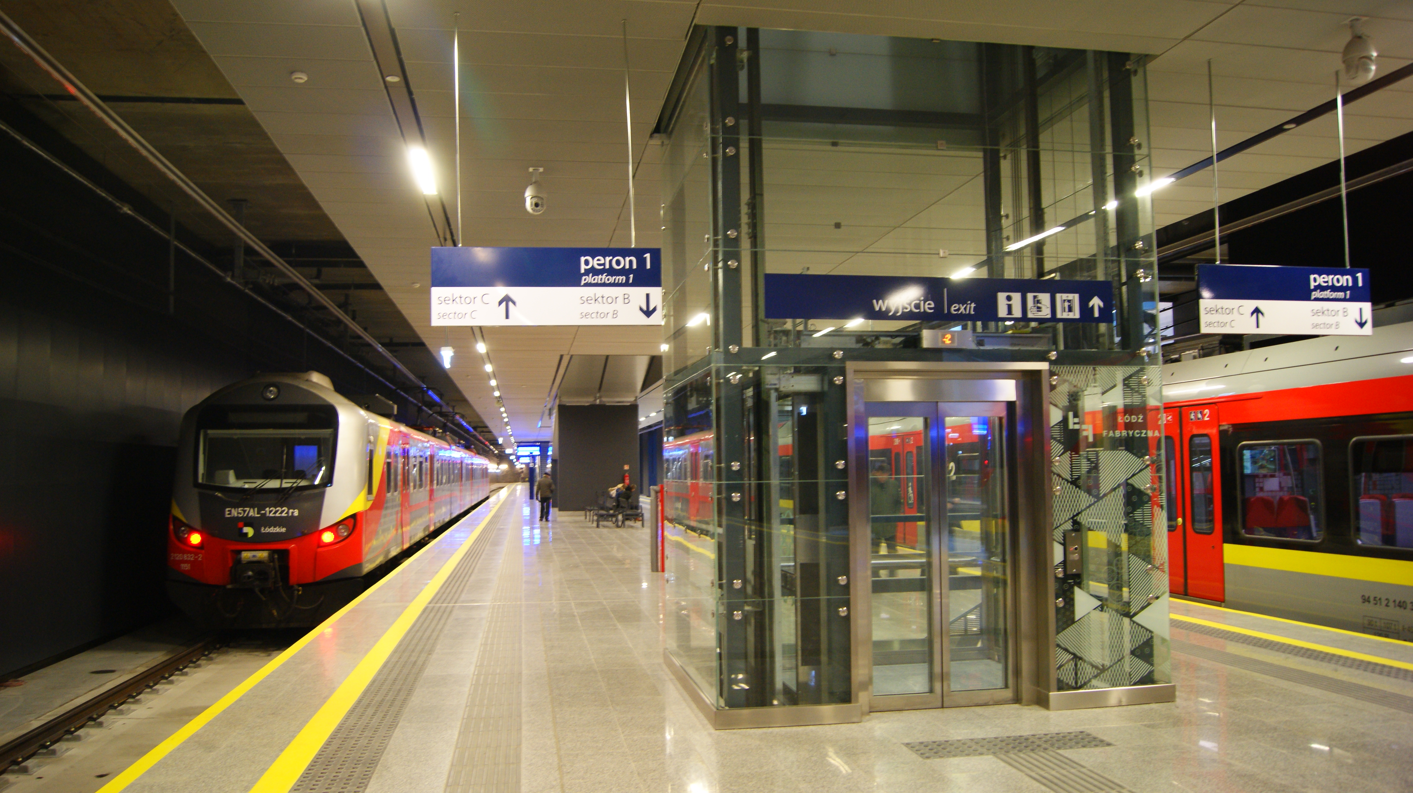 Nowy Dworzec Łódź Fabryczna.